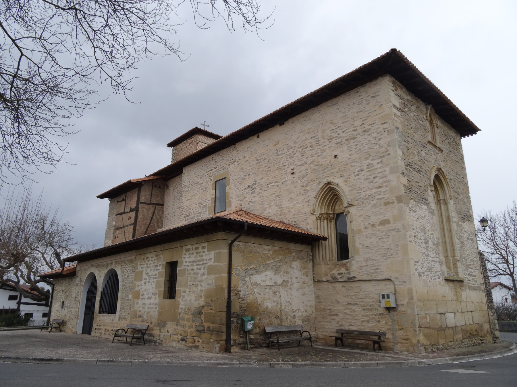 Iglesia de Lopidana (Vitoria-Gasteiz)